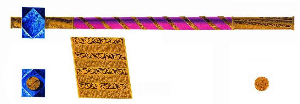 Брус с навершием из лазурика. «Булава Самфирная, граненая, черен поволочен бархатом червчатым, по бархату перевив серебряная золочена и чернью наведена через грань; на трубке под булавою написано Государево Царево и Великаго Князя Михаила Федоровича всея Русии имя резью через грань; а другие грани резные золочены с чернью, да трубки на верху в исподи серебряные ж резные золочены через грань с чернью. А по нынешней переписи рч`є года и по осмотру, та булава против прежних книг сошлась; цена той булаве пятьдесят пять рублев; а по прежней описной книге та булава написана первою надесять».